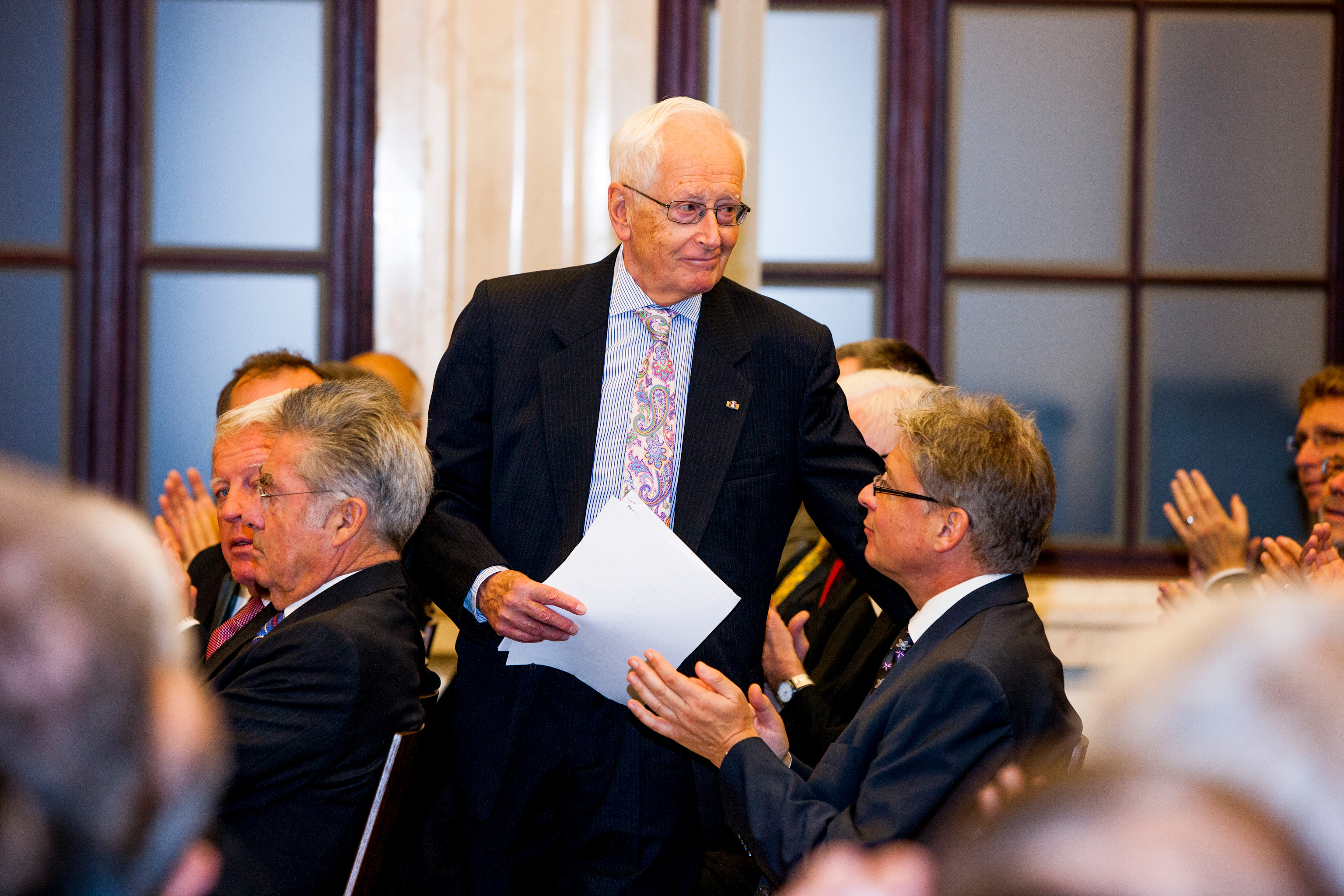 Der frühere Präsident des Verfassungsgerichtshofs, Ludwig Adamovich, beim Verfassungstag 2013 am VfGH.